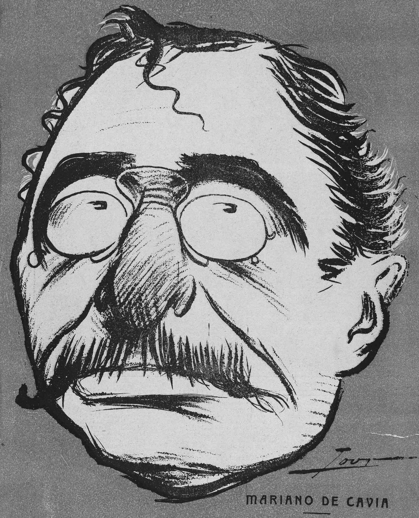 Eduardo de Palacio. Hijo del noble aragón, es para toda campaña autorizado guión; Cávia es la pluma, es España, de mayor circulación.